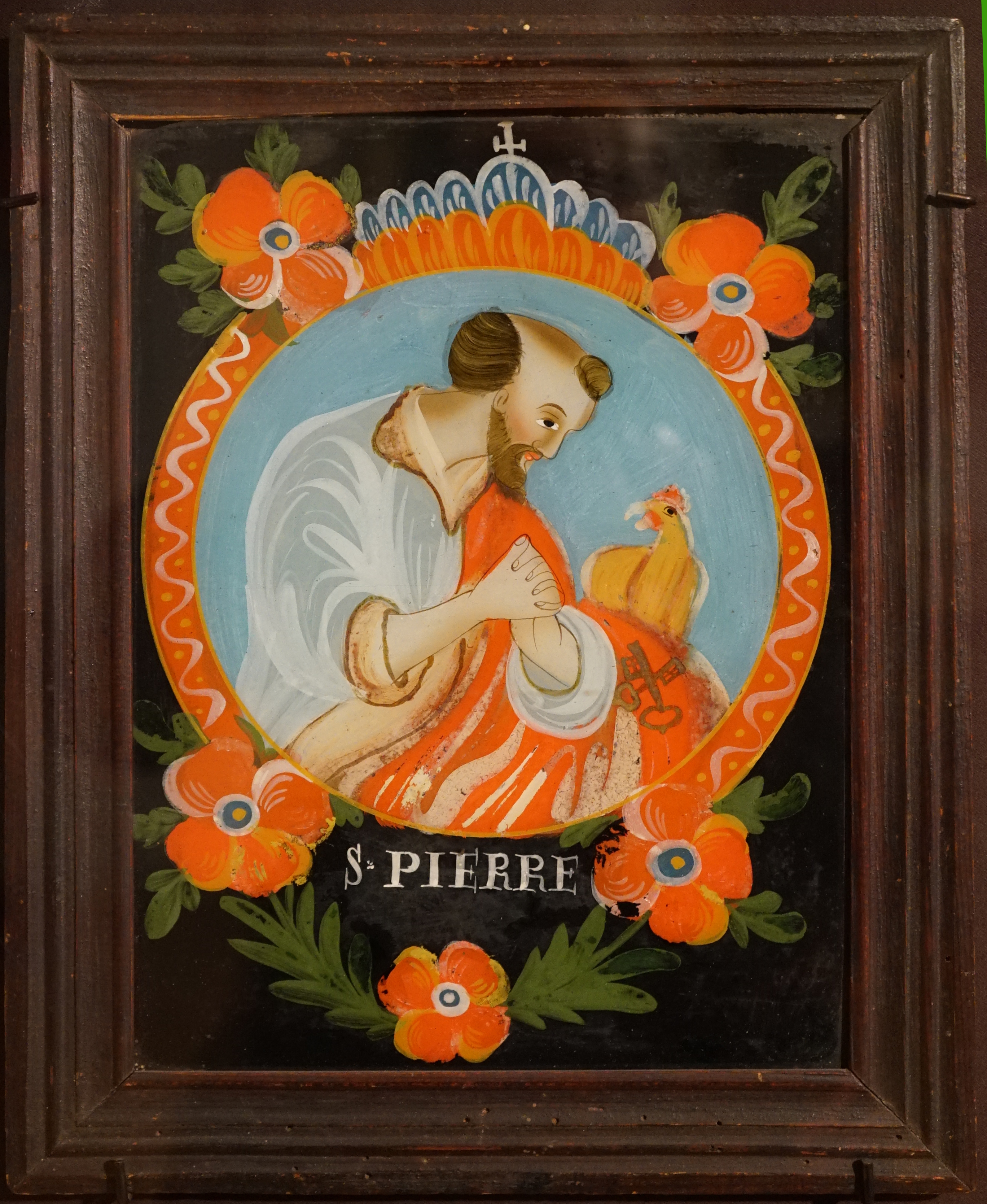 art populaire.